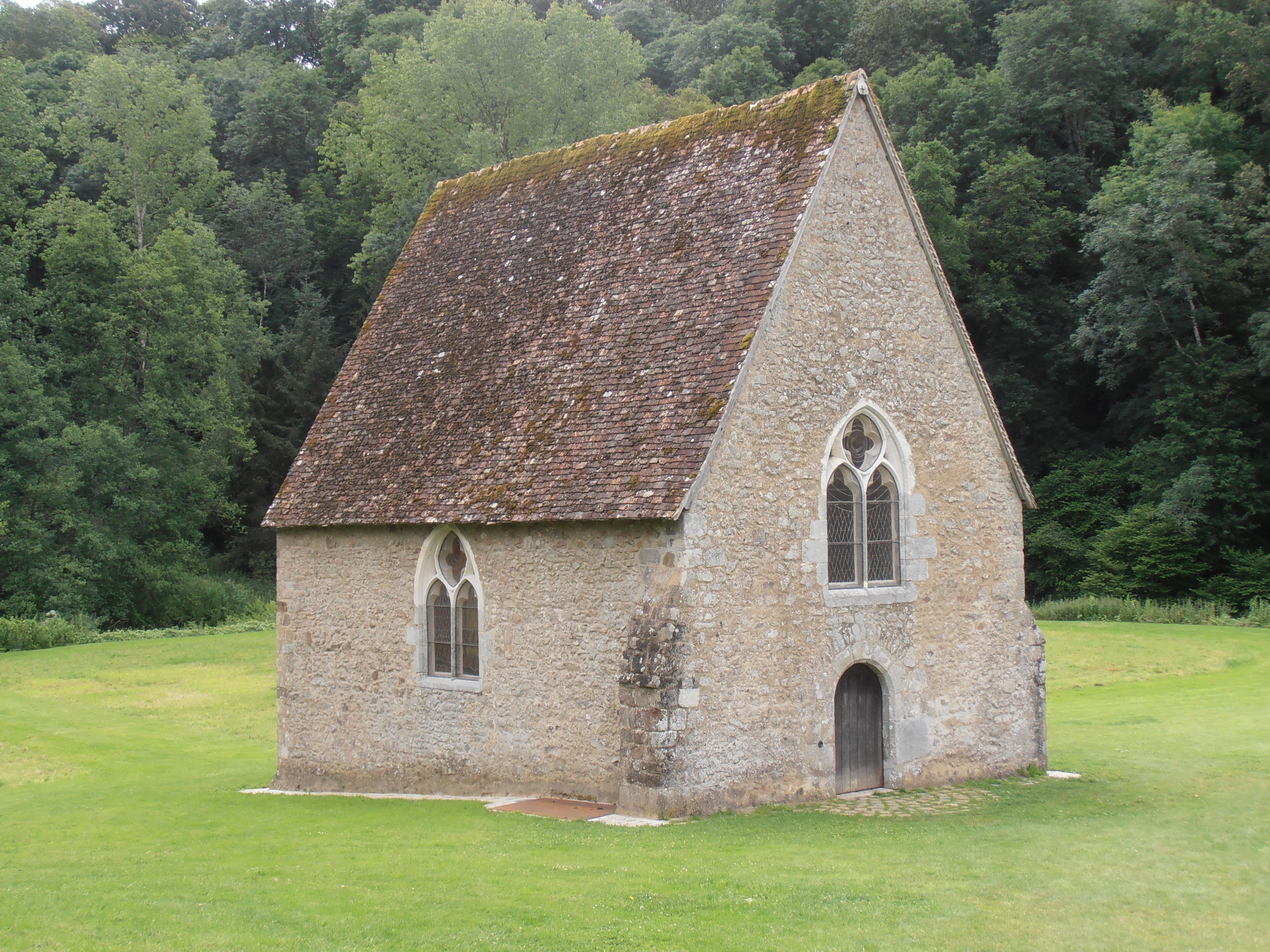 Chapelle de Saint-Céneri-le-Gérei (Orne), érigée au 15ème siècle à l'emplacement où a vécu Céneri